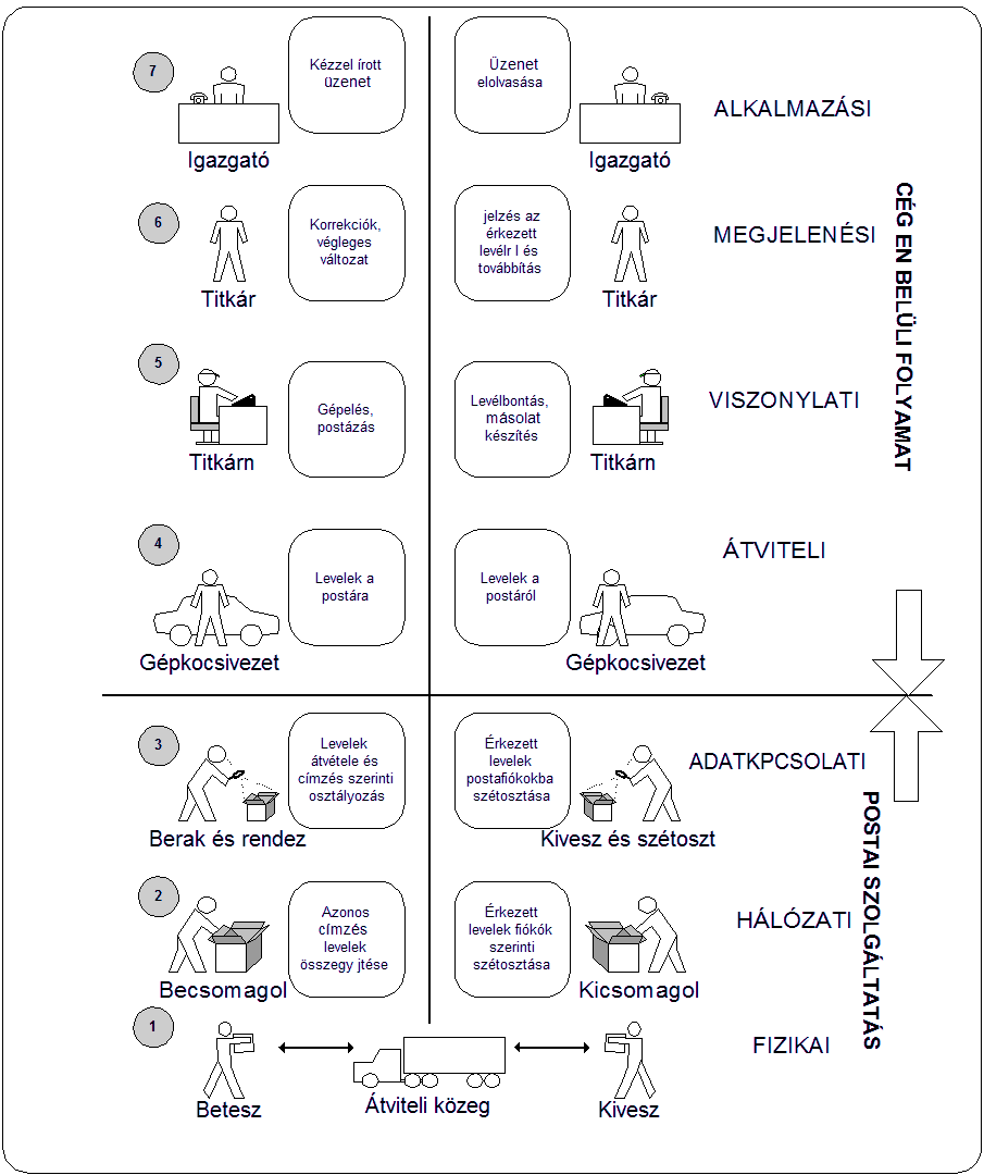 Az OSI rétegek és vállalati megfelelője